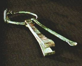 Völkerwanderungszeitliches Toilettebesteck mit Pinzette und Ohrlöffelchen (rechts) Hilzingen Hegau 4. Jahrhundert